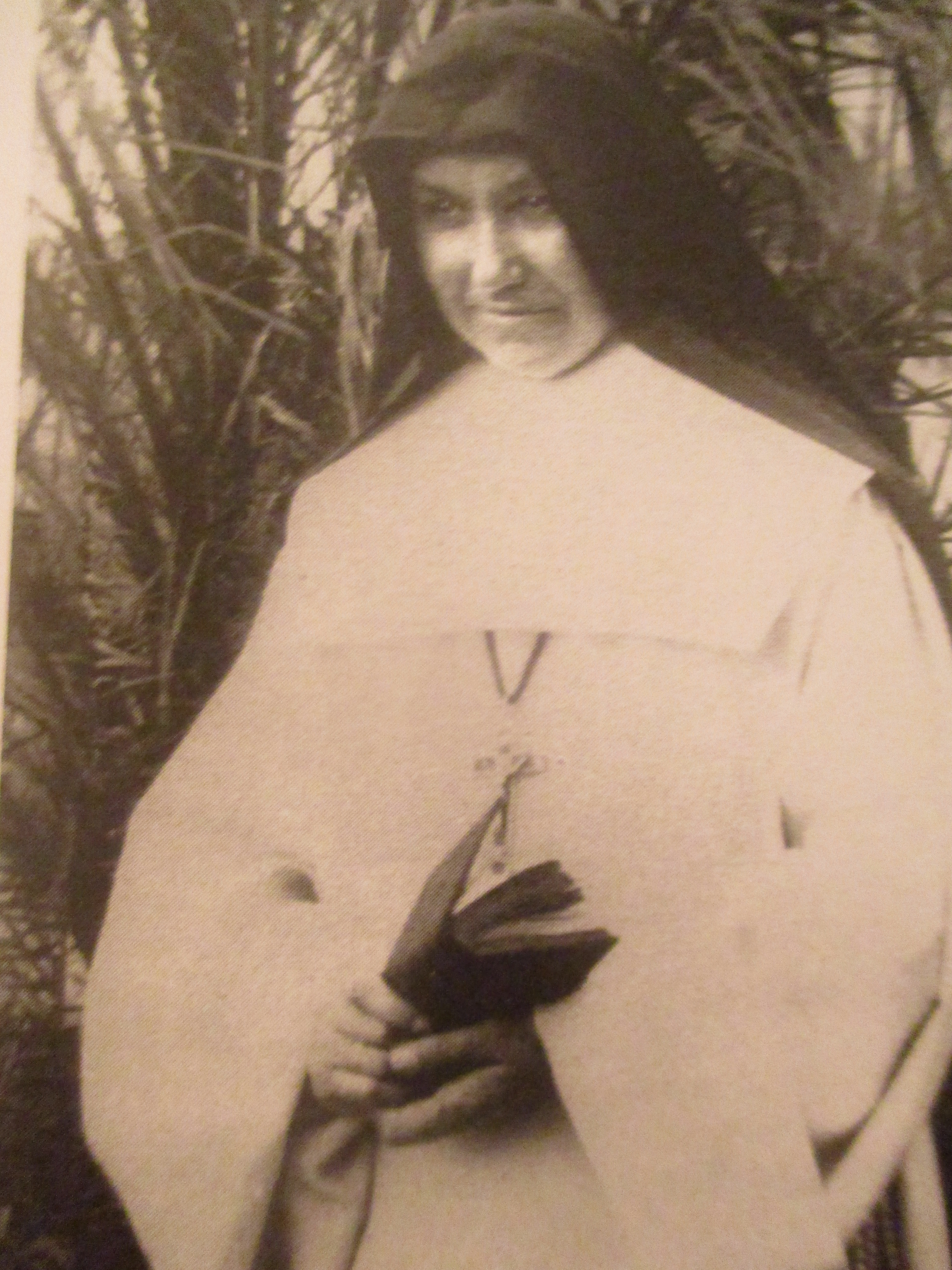 Mère Marie-Salomé (1847-1930), cofondatrice des Soeurs de Notre-Dame d'Afrique.